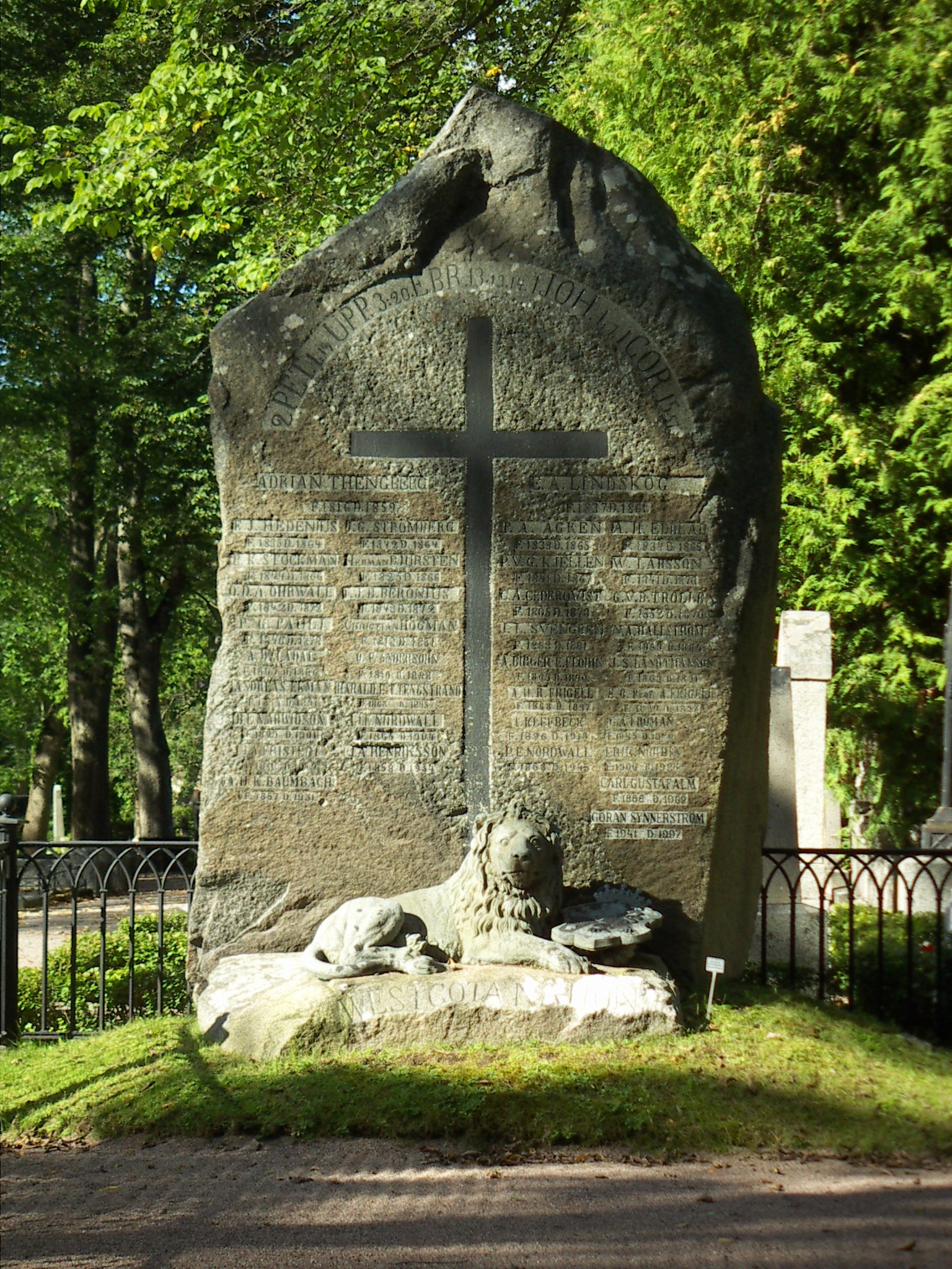 Västgöta nations grav på gamla kyrkogården i Uppsala.